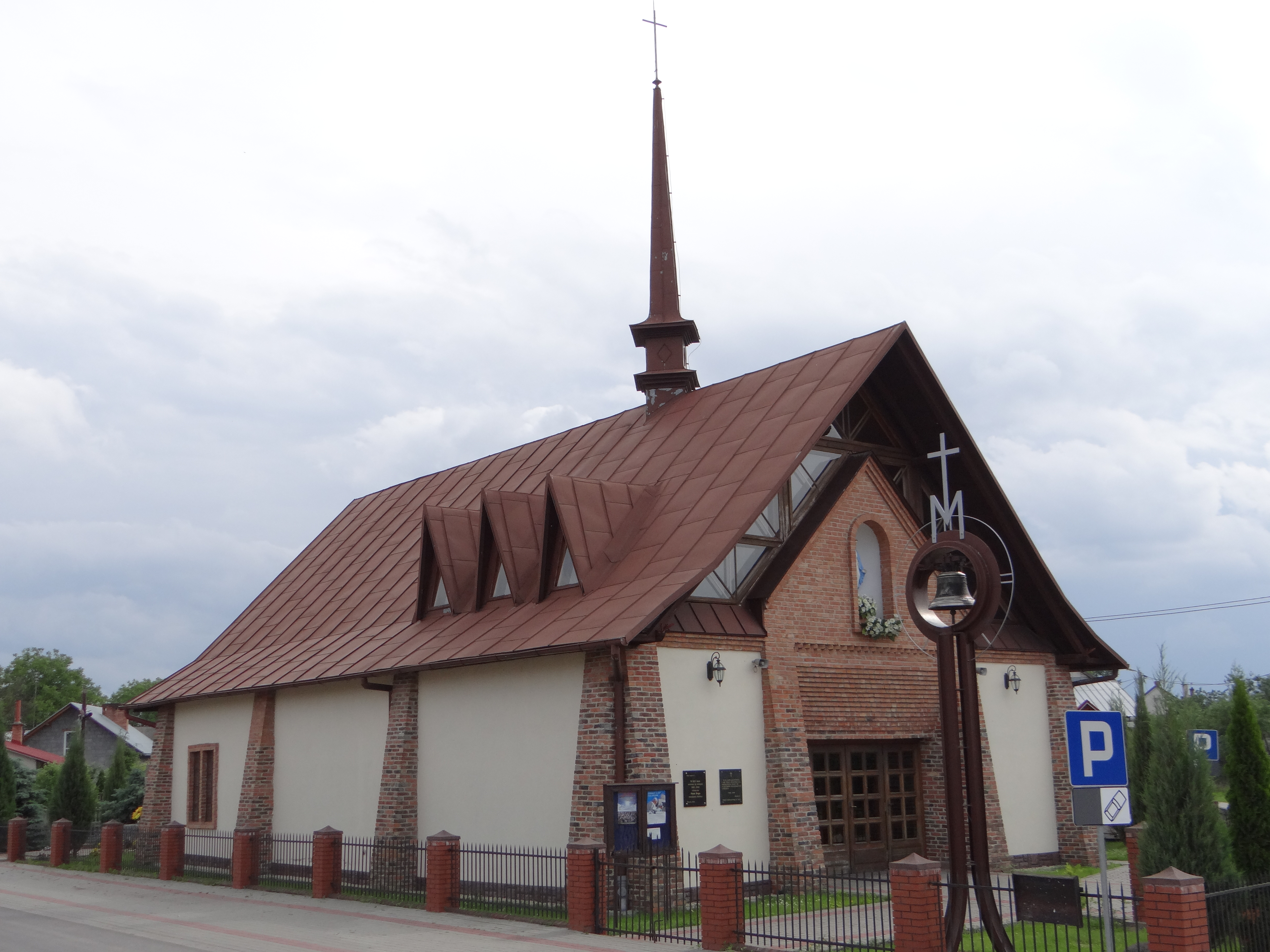 Zdjęcie wykonane w miejscowości Bieliniec, powiat niżański.